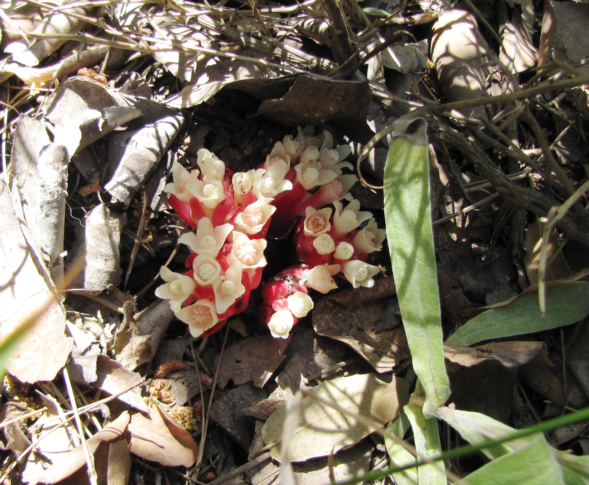 Cytinus ruber (mount Carmel, Israel) רִמּוֹנִית הַלֹּטֶם